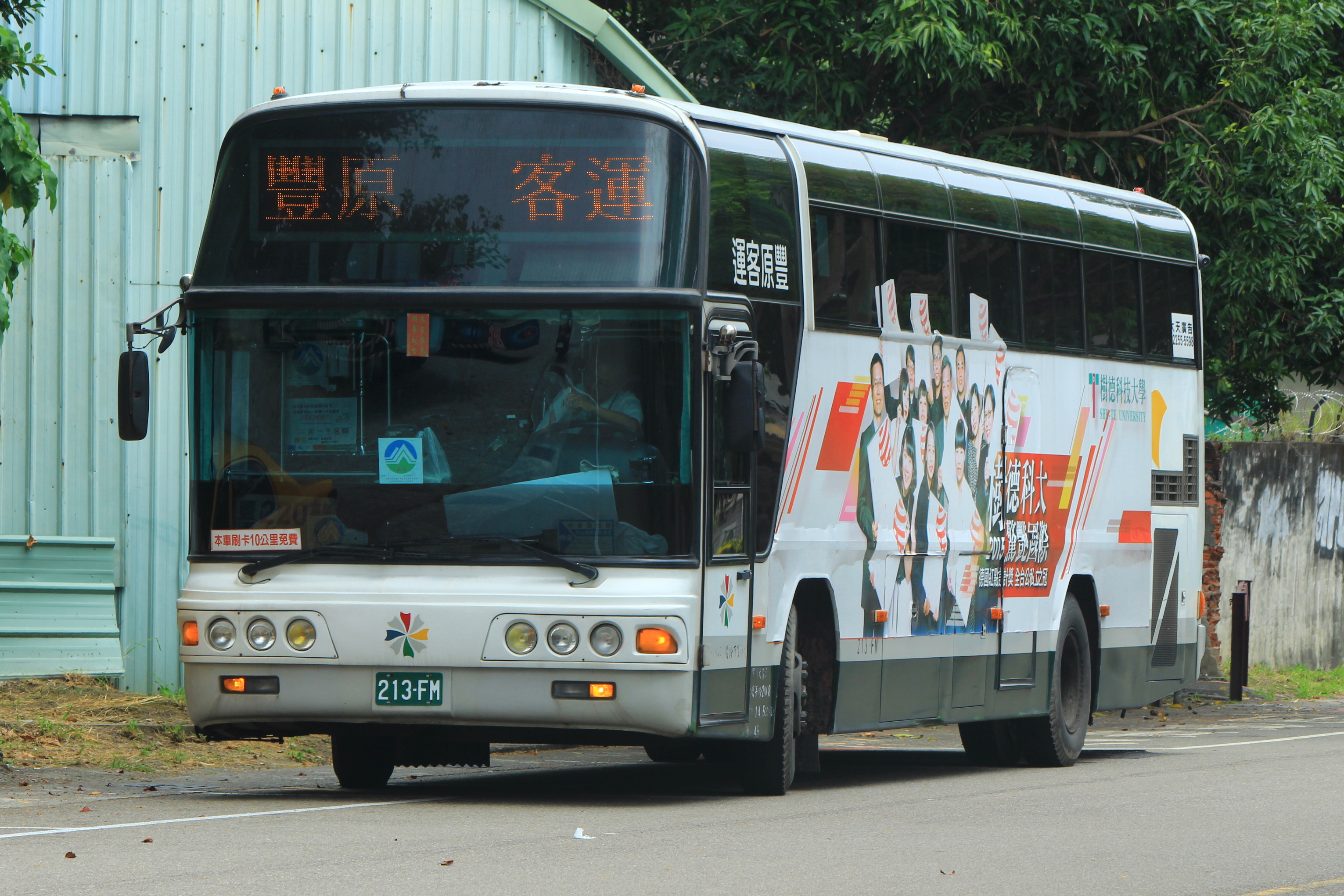 豐原客運日野RK8JRSA大客車213-FM。